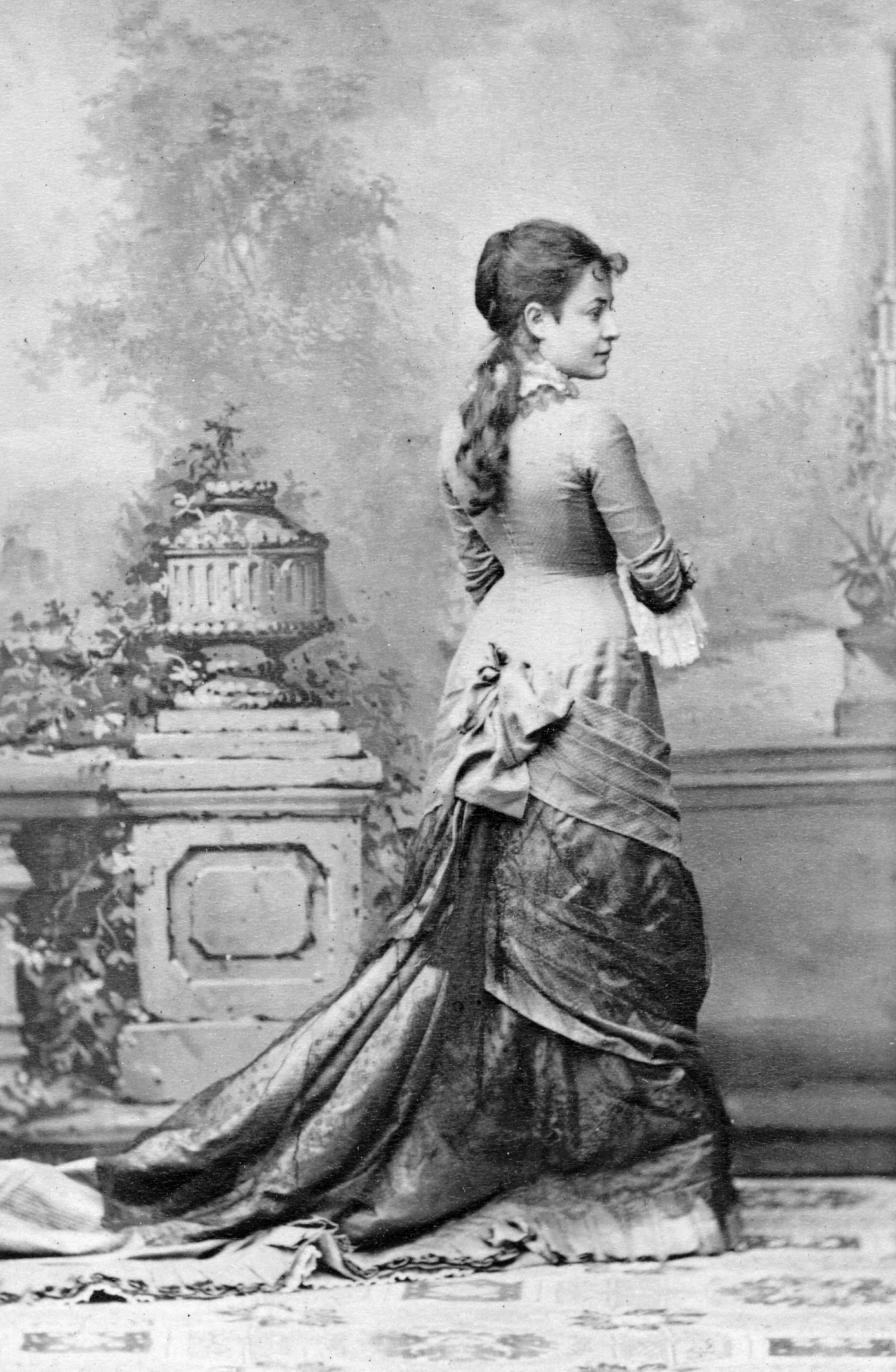 Ida Reis, skådespelare vid Kungliga Dramatiska teatern 1877